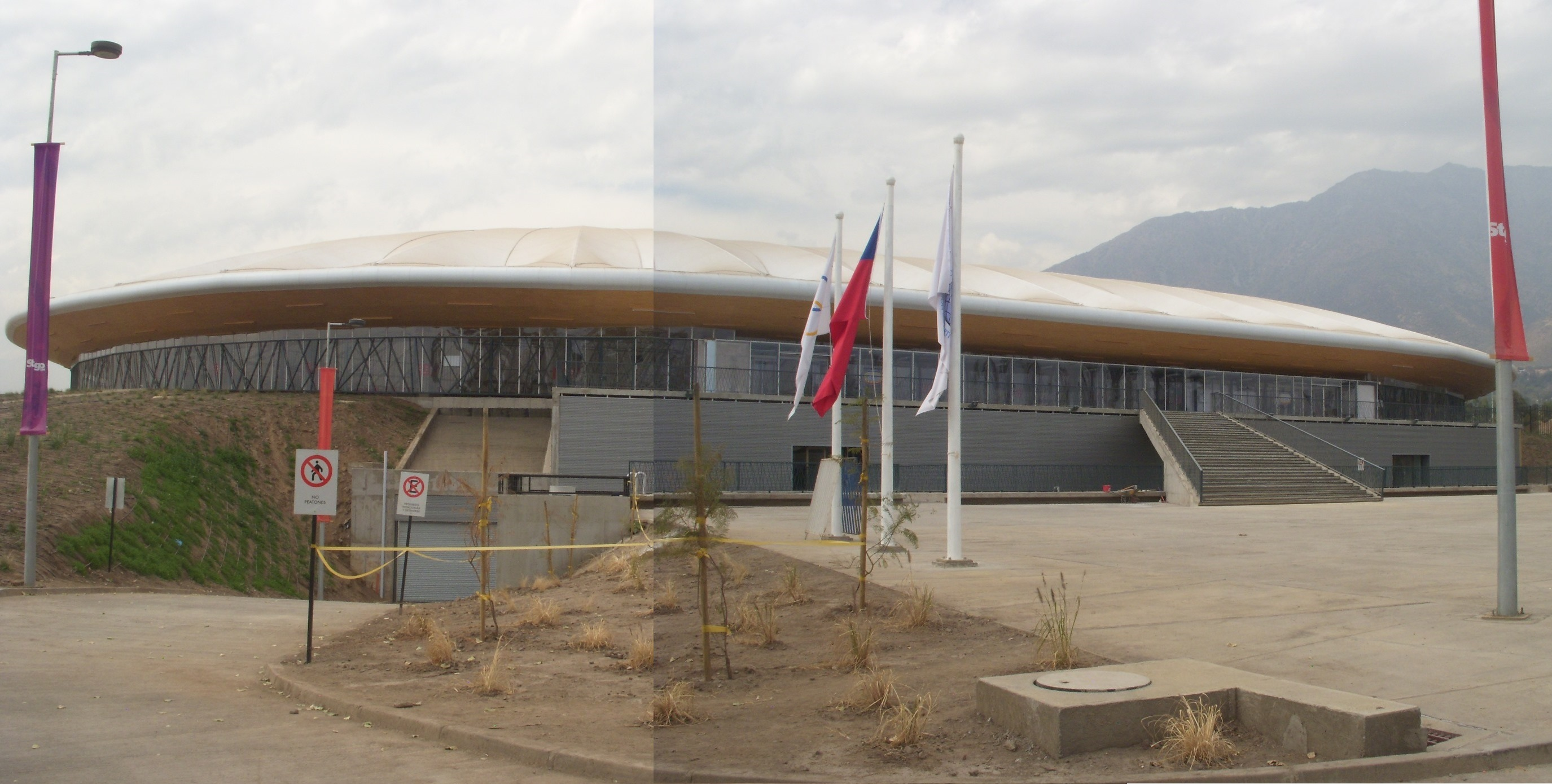 Velodromo de Peñalolen